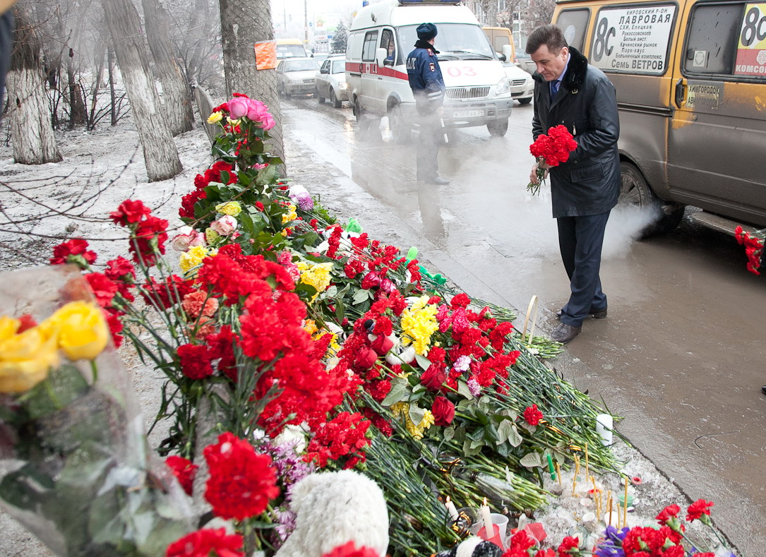 Глава администрации Волгоградской области Сергей Боженов возлагает цветы к месту теракта в Волгограде